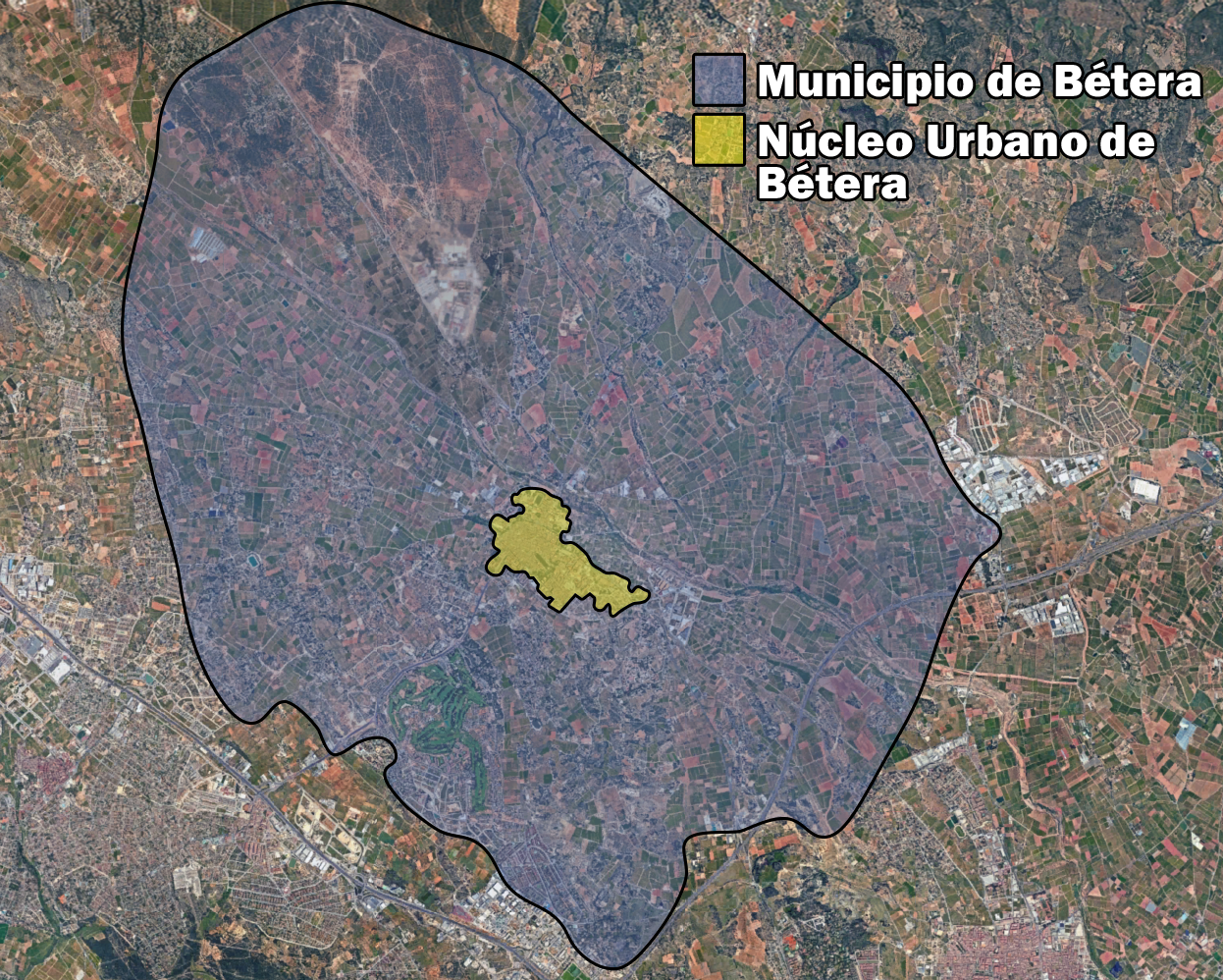 Mapa que compara el Municipio de Bétera (azul) y el Núcleo Urbano de Bétera (amarillo).